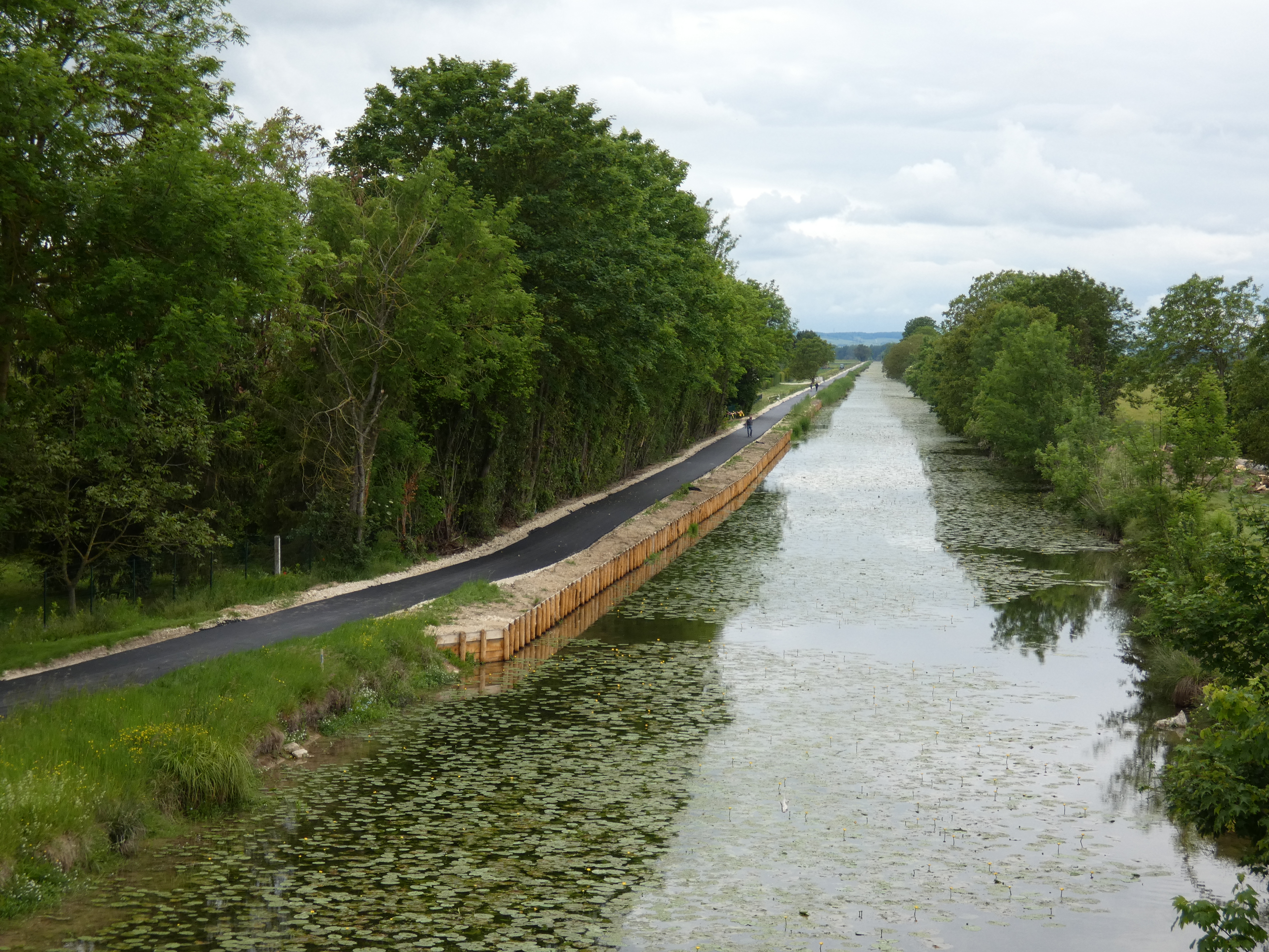 Véloroute du canal de la Haute-Seine. 51260 Clesles.